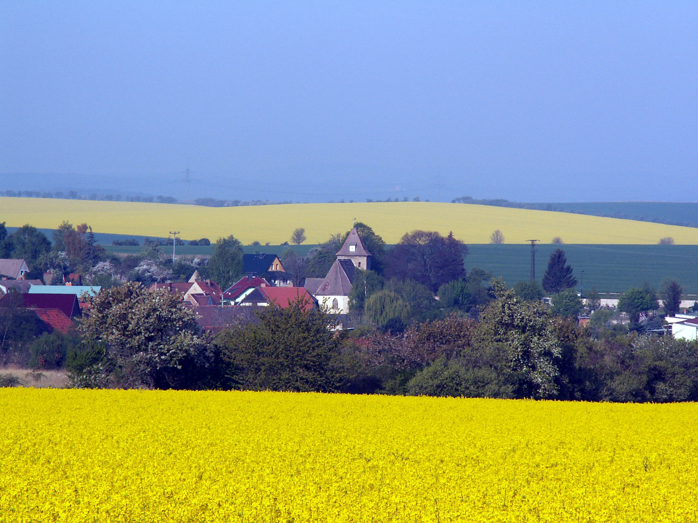 Blick auf Westdorf